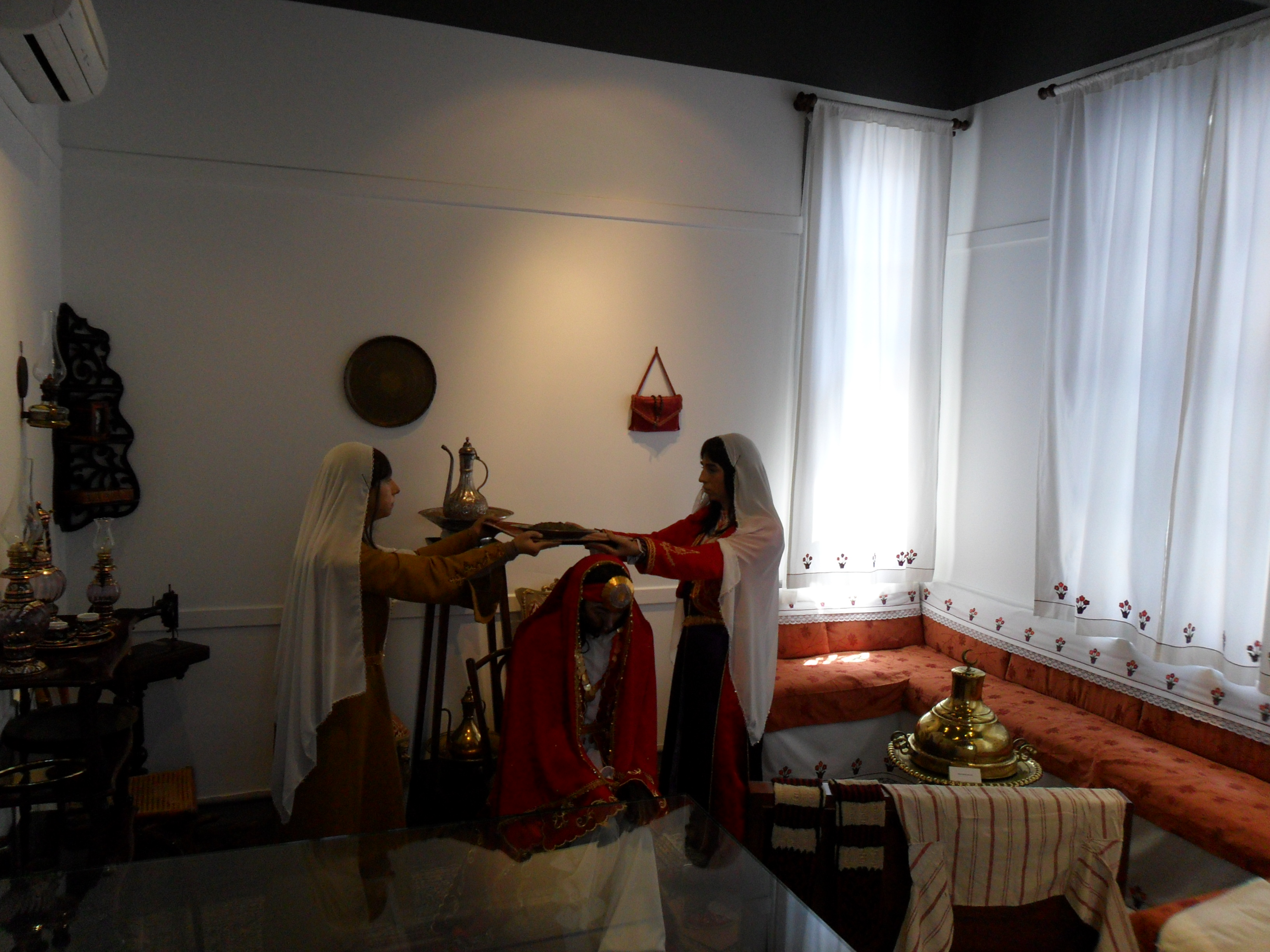 Samsun Kent Müzesi'nde bir kına gecesi canlandırması.